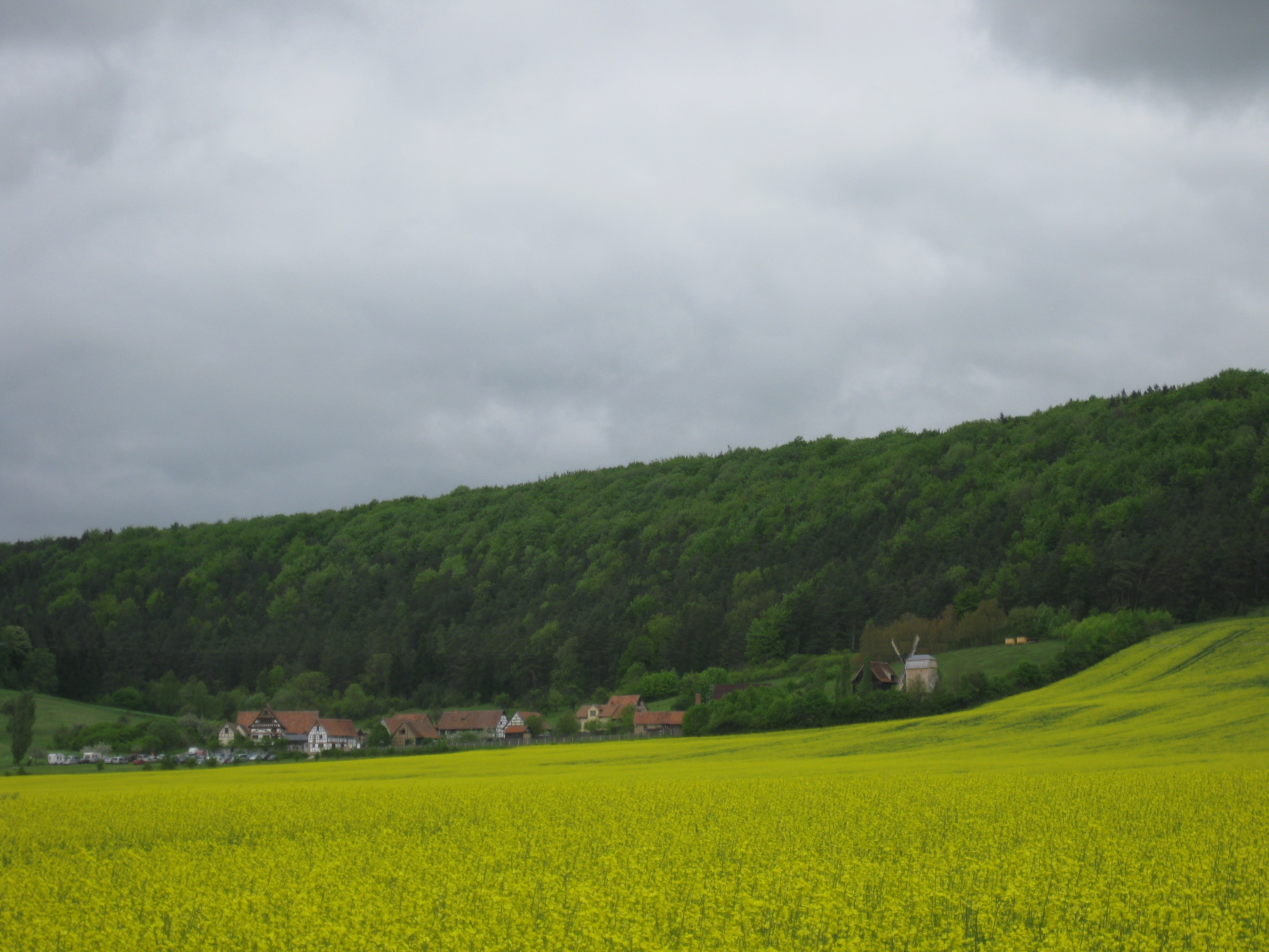 Das Freilichtmuseum Hohenfelden (im Hintergrund der Eichberg)